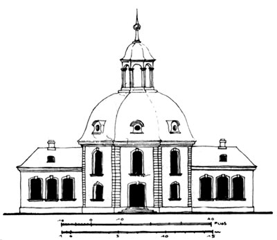 Vue de l'institut d'anatomie Senckenberg à Francfort-sur-le-Main.